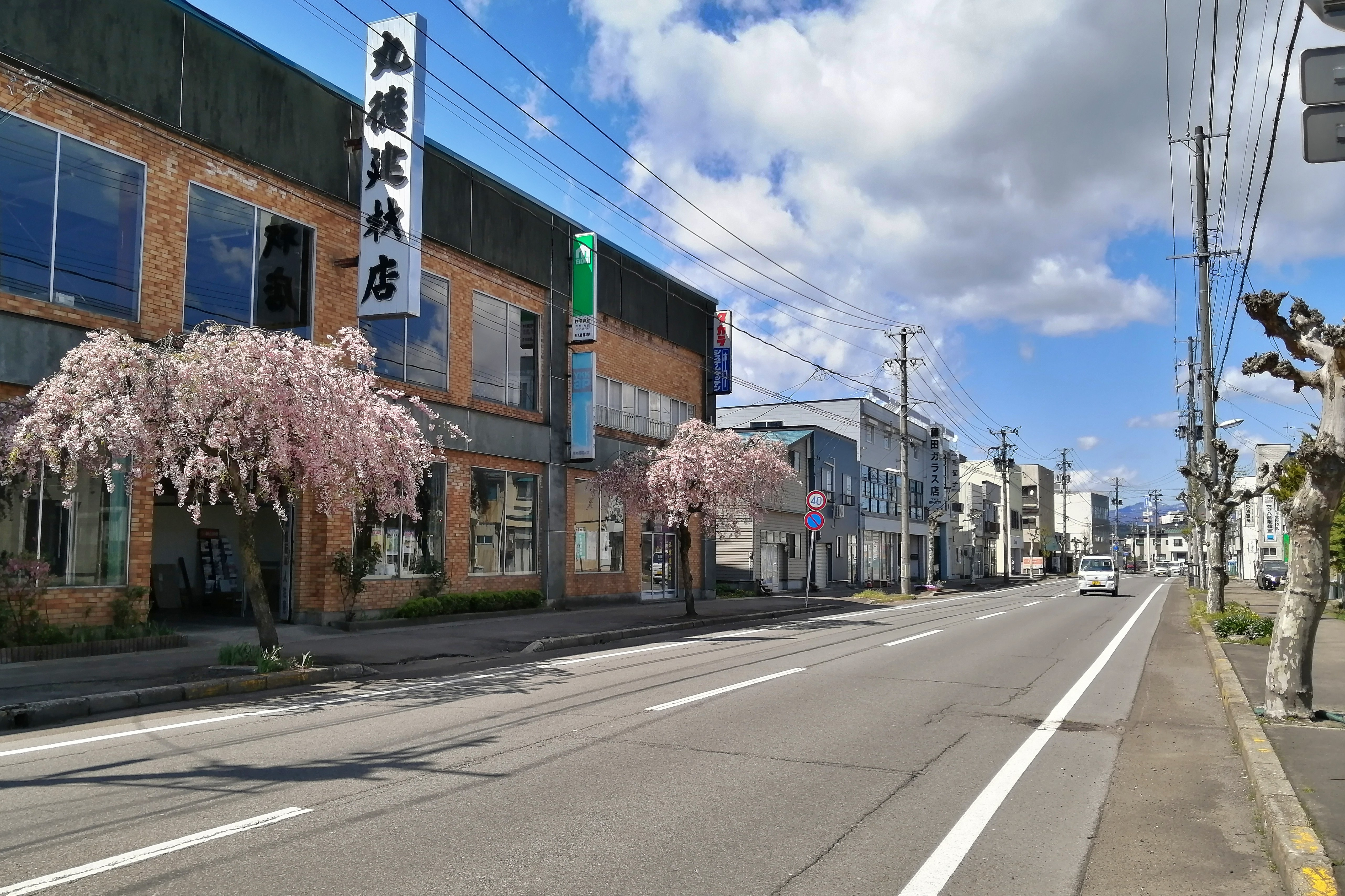 北秋田市米代町